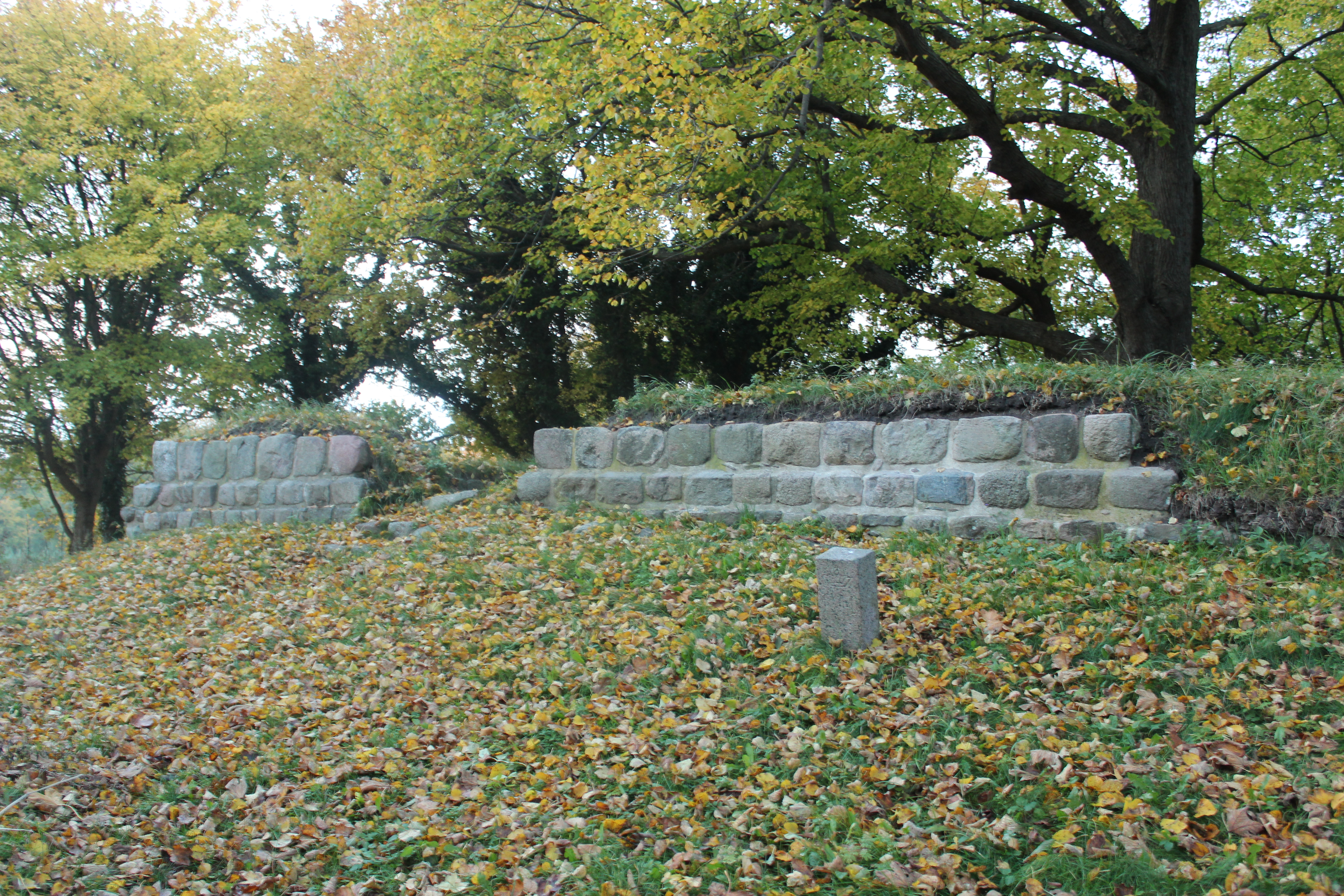 Fundament af ydermurene